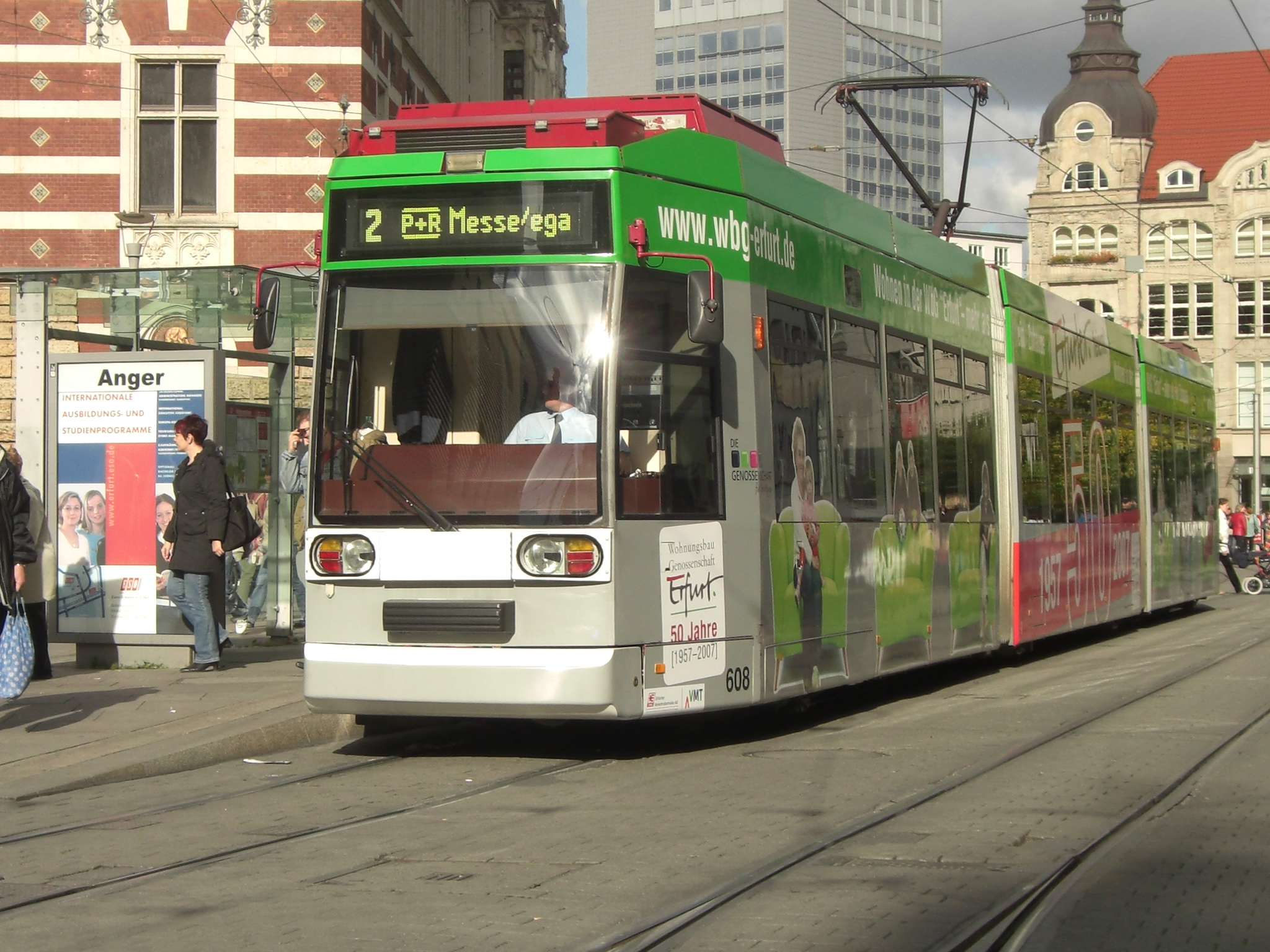 Tw 608 Erfurter Strassenbahn am Anger